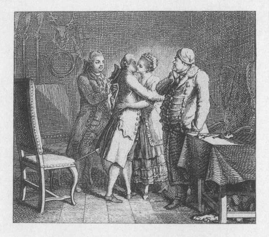 Titelvignette zu Nicolai's Freuden des jungen Werther. Werther im Jägerhause umarmt Lotte, der Amtmann steht rechts, Albert links. Eines der reizendsten Blätter des Künstlers. (Beschreibung lt. Quelle)